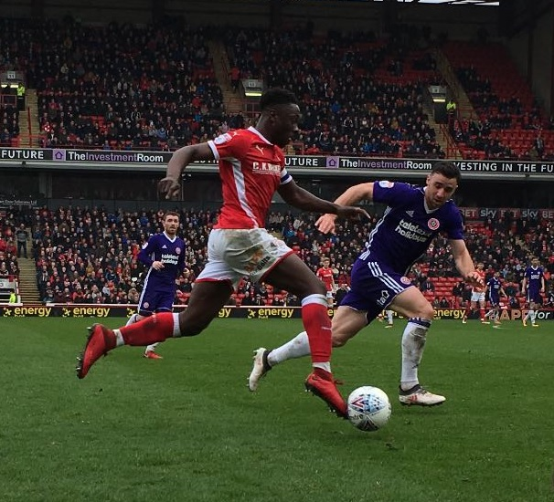 Andy Yiadom tijdens Barnsley FC - Sheffield United (07-04-2018)